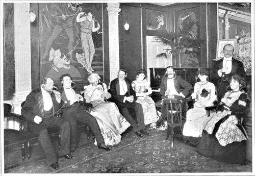 Fotografie eines Electrophone-Salons (Original caption: "In the Electrophone Salon (Garrard Street)" This was the location of the London headquarters of the Electrophone Company.)